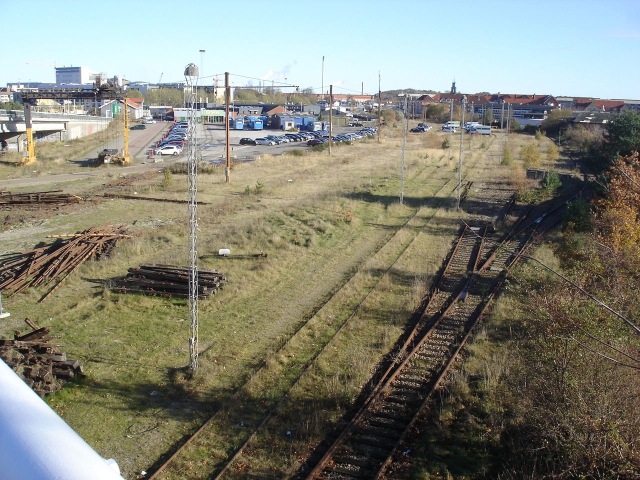 Aalborg Privatbaners værksteds- og remiseområde set oppe fra Dag Hammarskjölds Gade. Hovedkontoret ses tv. neden for rampen